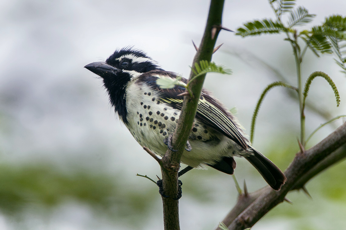 Spot-flanked Barbet - Kenya_IMG_5387